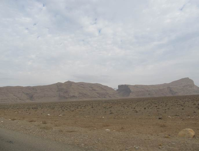 دورنمای منطقه کارستی واران